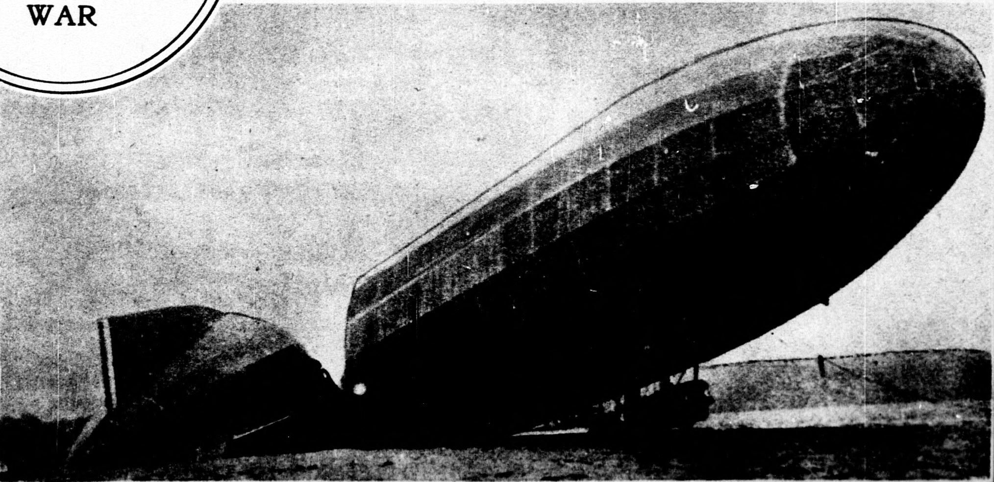 German L 20 Zepplin